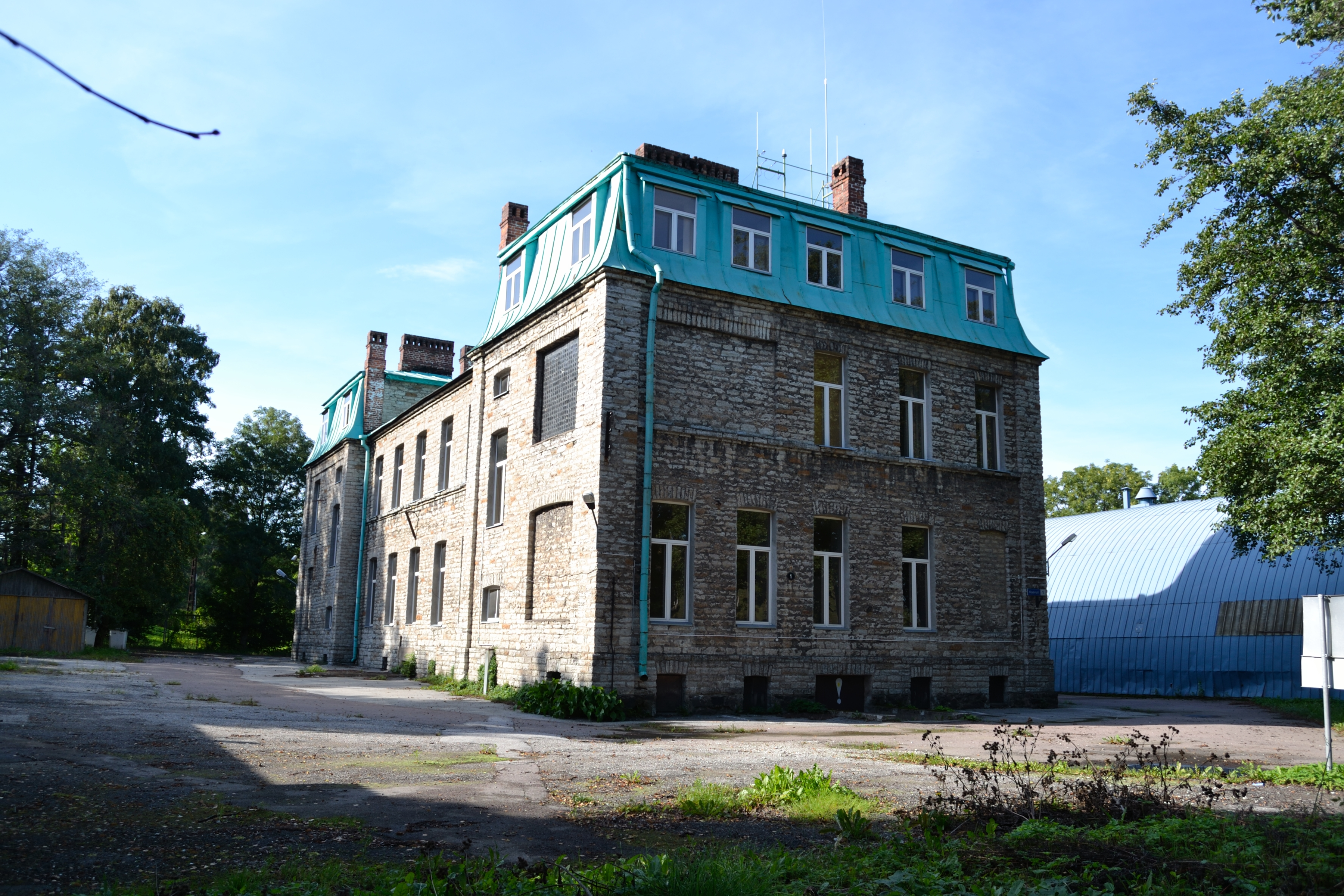 Tallinn, Vene-Balti laevatehase haigla, 1914